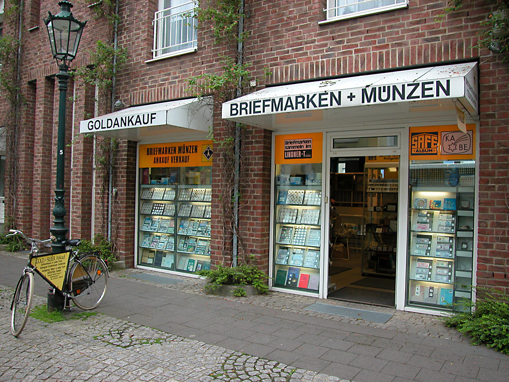 Akademiestraße, Düsseldorf-Altstadt